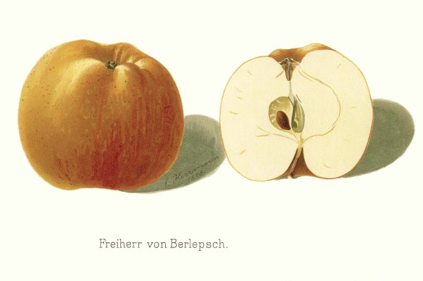 Goldrenette Freiherr von Berlepsch, veröffentlicht in den Pomologischen Monatsheften